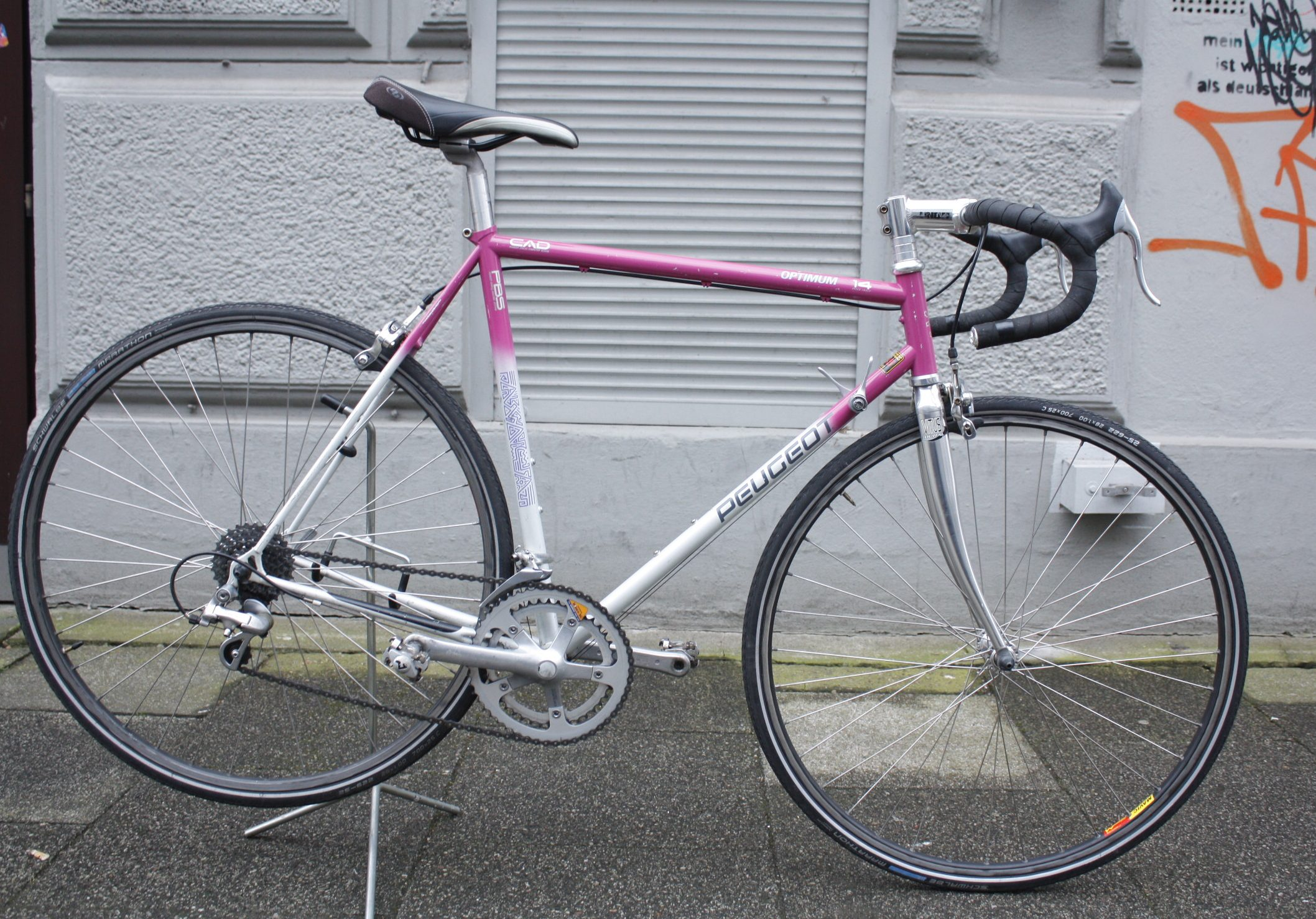 Peugeot Road Bike, 560 mm (c-c) CAD Model (TIG-welded from Reynolds 525) with a Vitus alu-fork